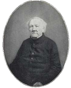 Johann Stephen Raffeiner (1785-1861)